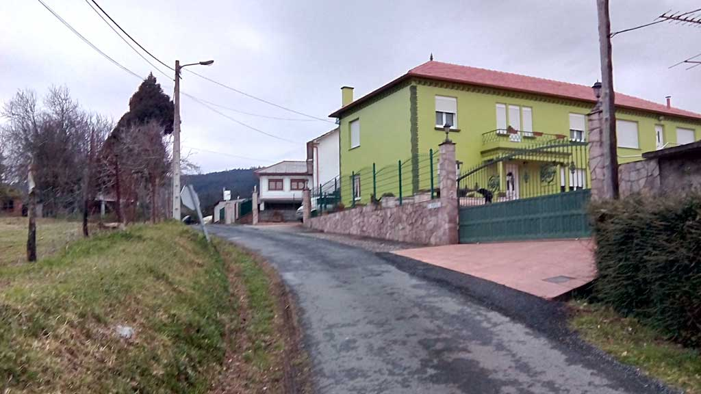 Vista de Piñeiros, Pedroso, Narón.